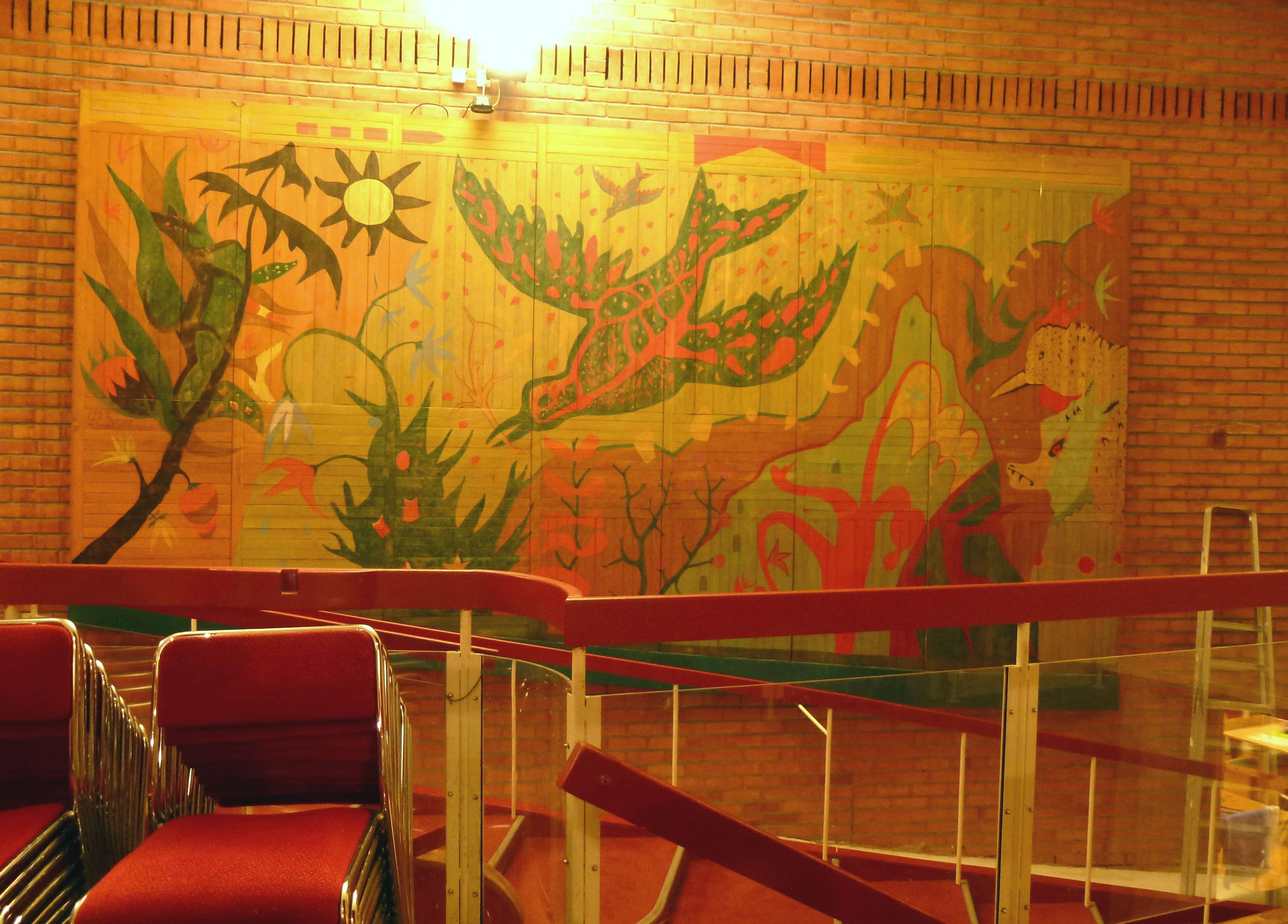 Årsta centrum forum, salen, målning av Uno Vallman